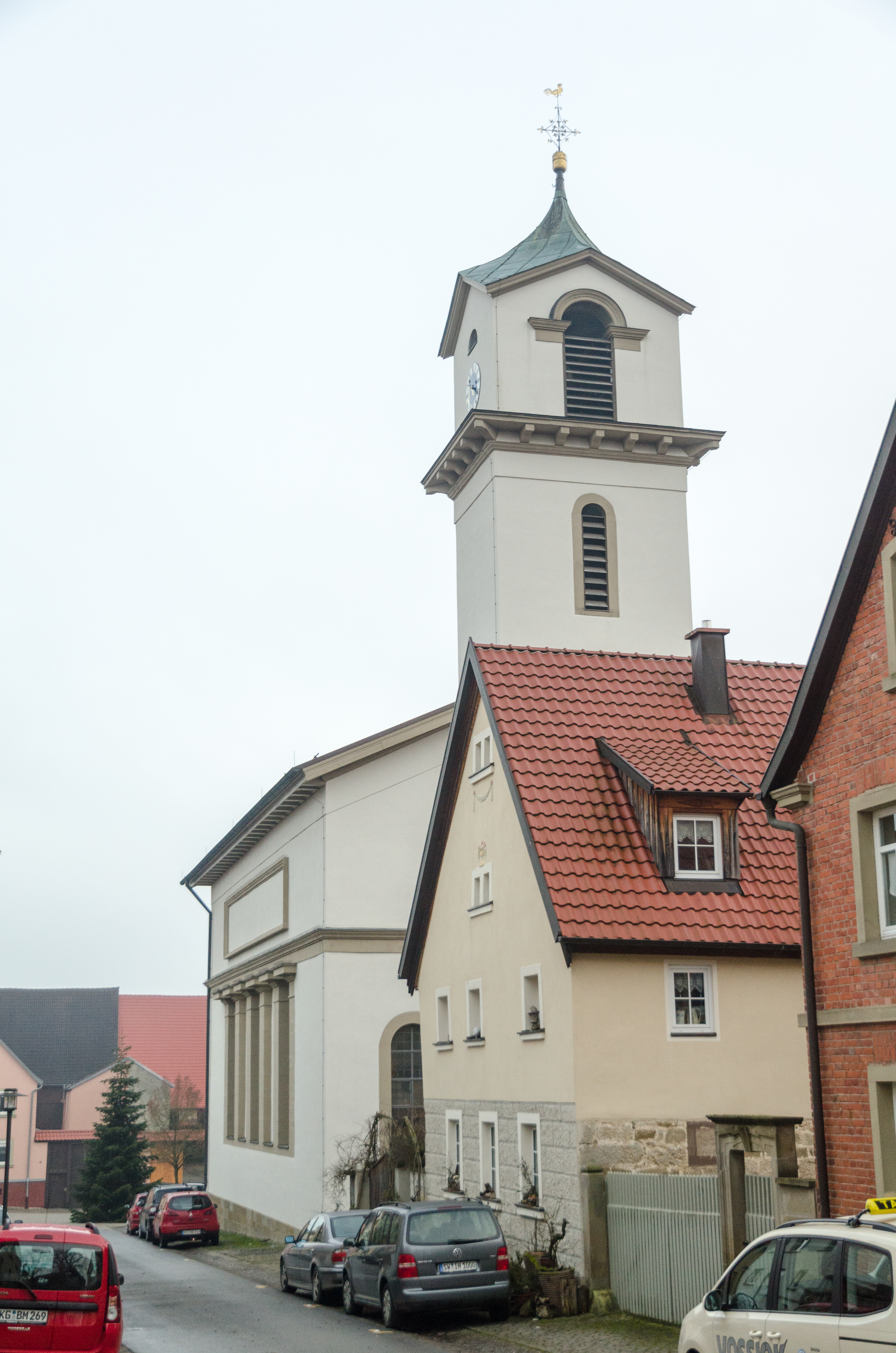 Oerlenbach, Ebenhausen, Katholische Pfarrkirche Allerheiligen